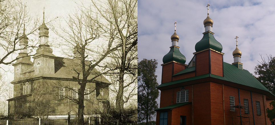 Беларуская (тарашкевіца): Маскалізацыя (русіфікацыя) Вялікага Княства Літоўскага. Вёска Валавель Пінскага павету. Царква Сьвятога Юрыя, помнік традыцыйнай беларускай драўлянай архітэктуры з элемэнтамі стылю барока: аўтэнтычны выгляд (налева) і па частковым руйнаваньні ў выніку маскоўскай перабудовы (направа)